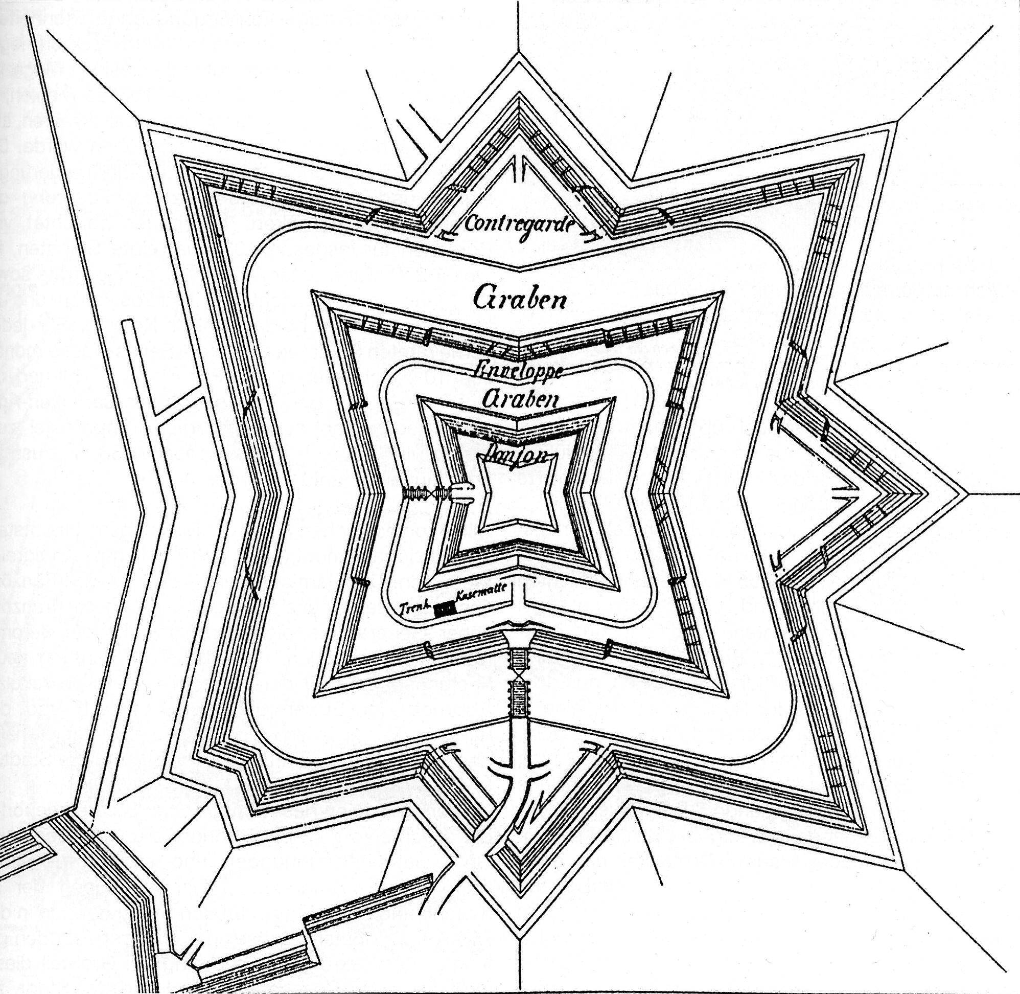 Grundriss des Fort Berge in Magdeburg, Sachsen-Anhalt